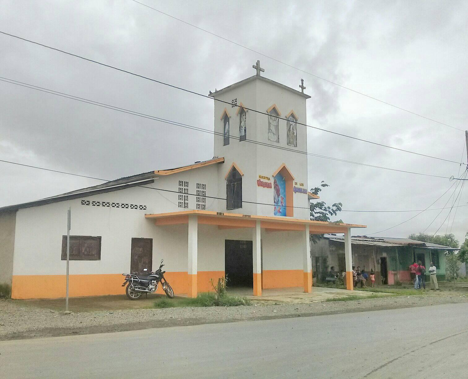 Iglesia de Nuestra Señora de Los Ángeles, en la parroquia Los Ángeles (Ecuador).